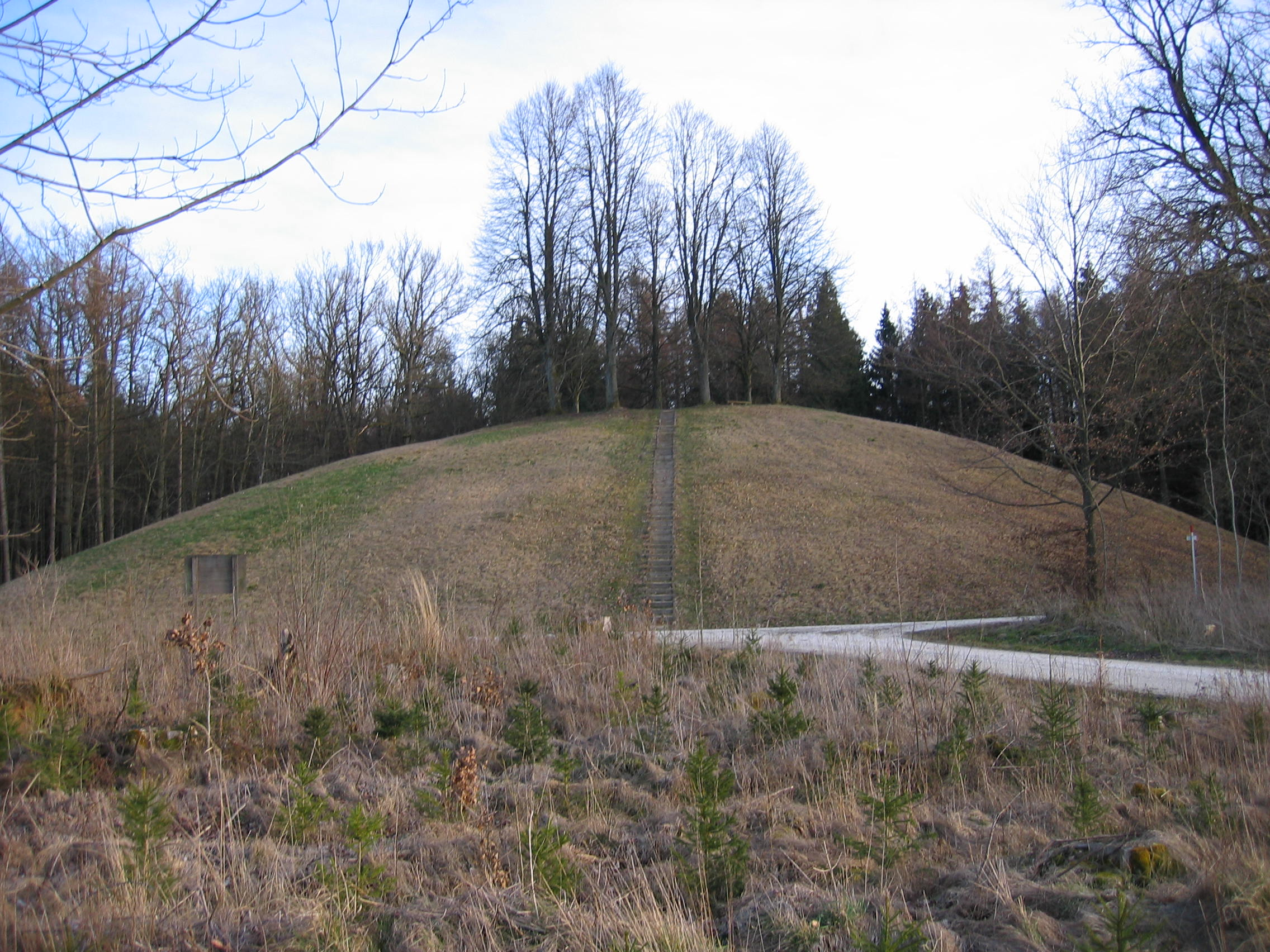 Keltischer Grabhügel Hohmichele bei Altheim